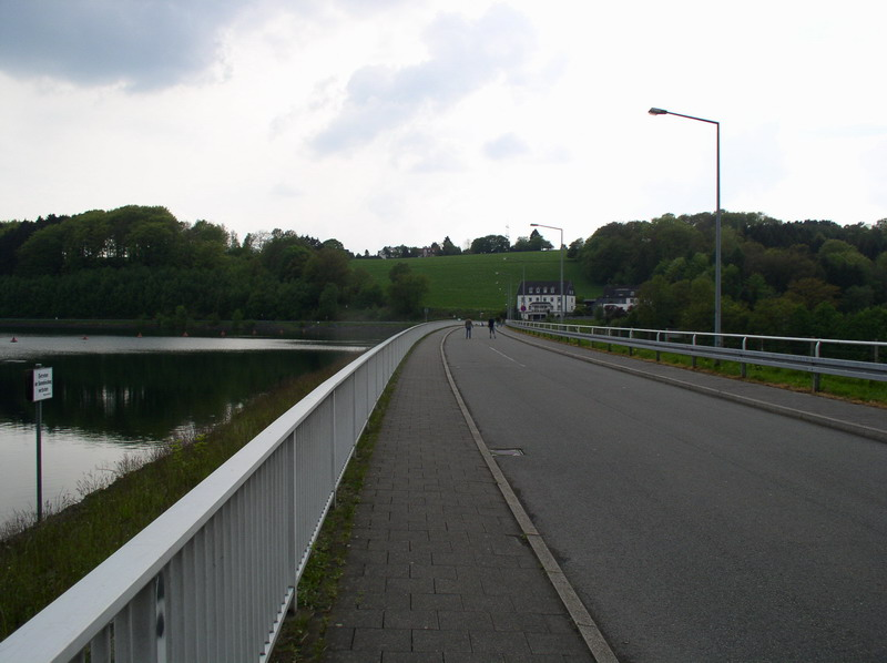 Der Damm der Wuppertalsperre